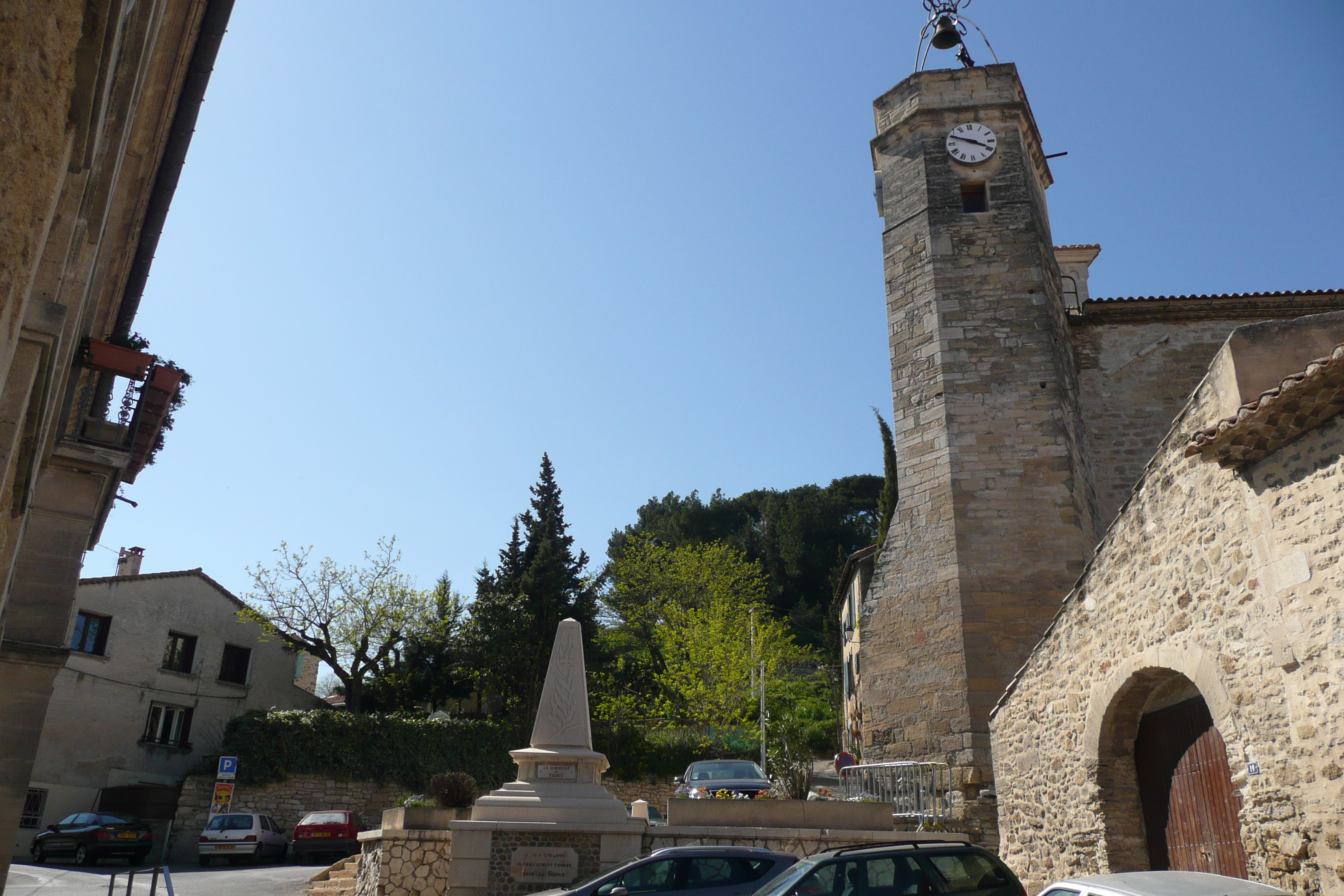 Église à Pujaut